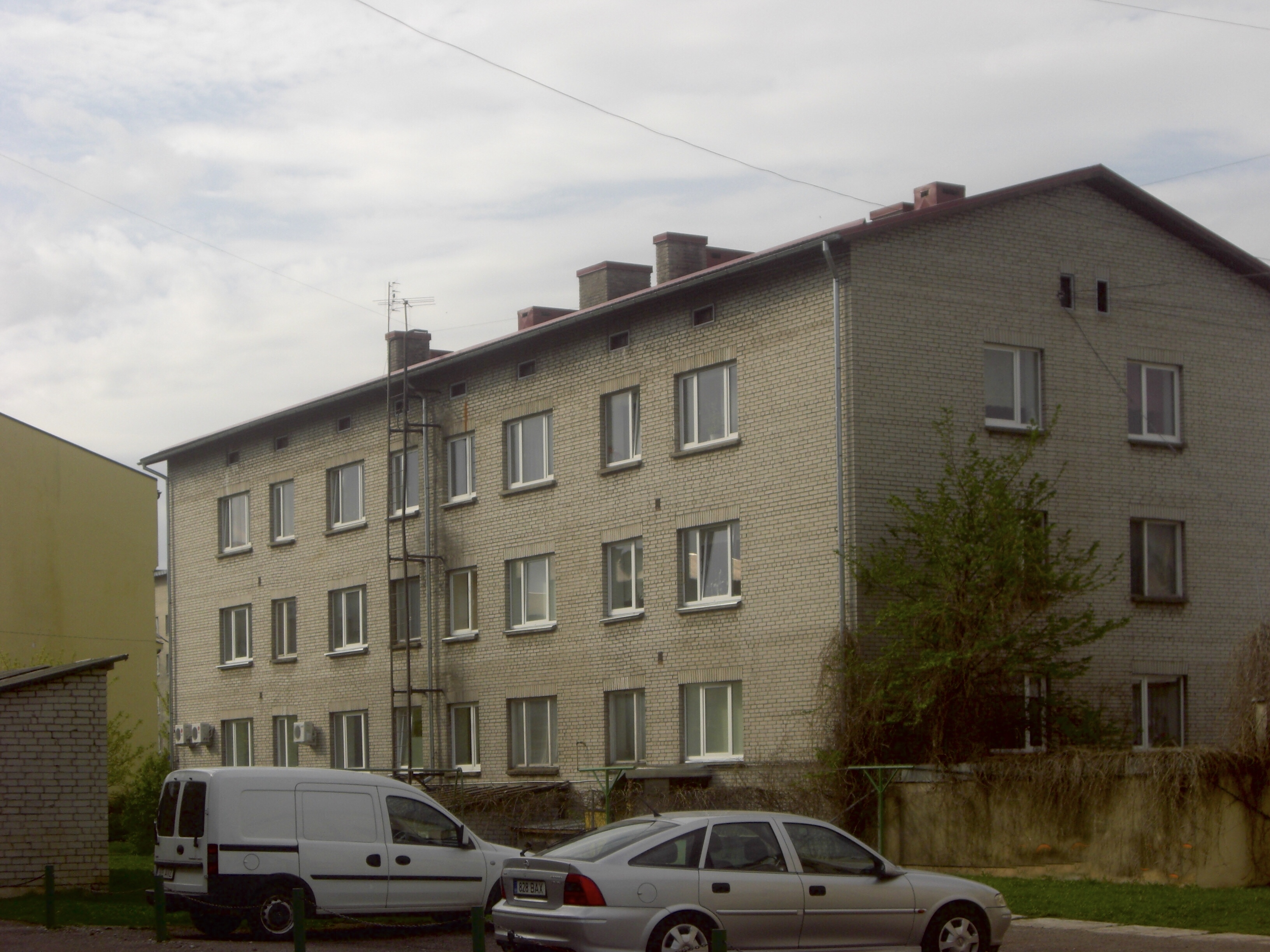 Lai 5, Rakvere